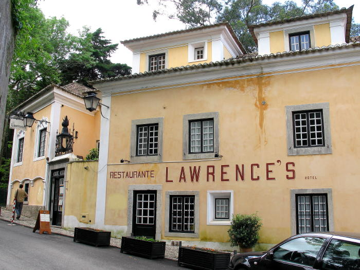 Restaurante em Sintra